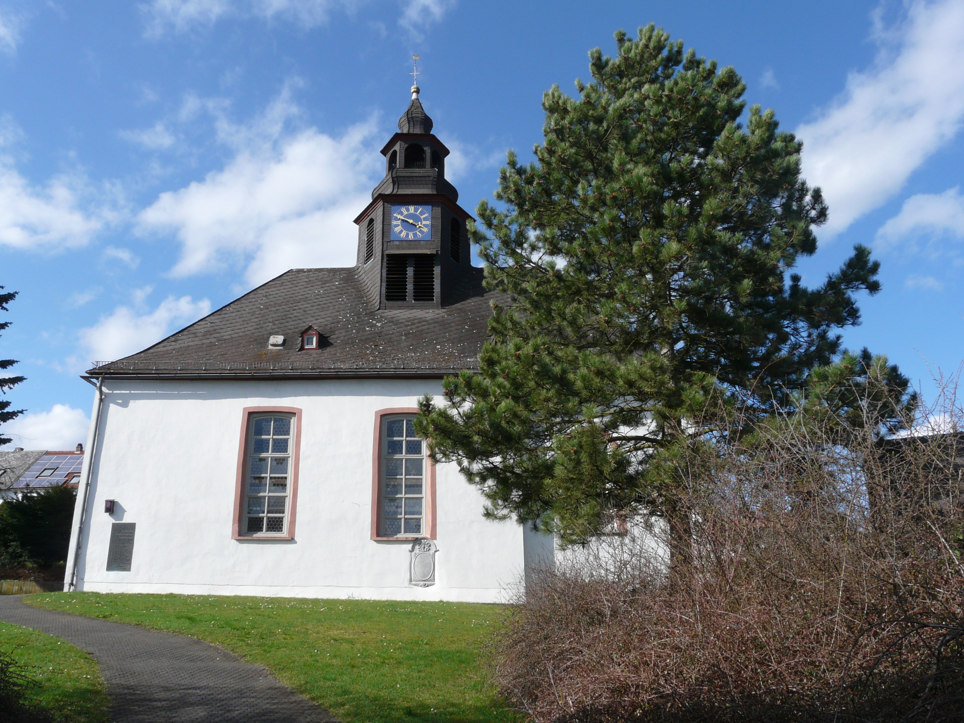 Evangelische Kirche in Solms-Oberbiel (Lahn-Dill-Kreis)